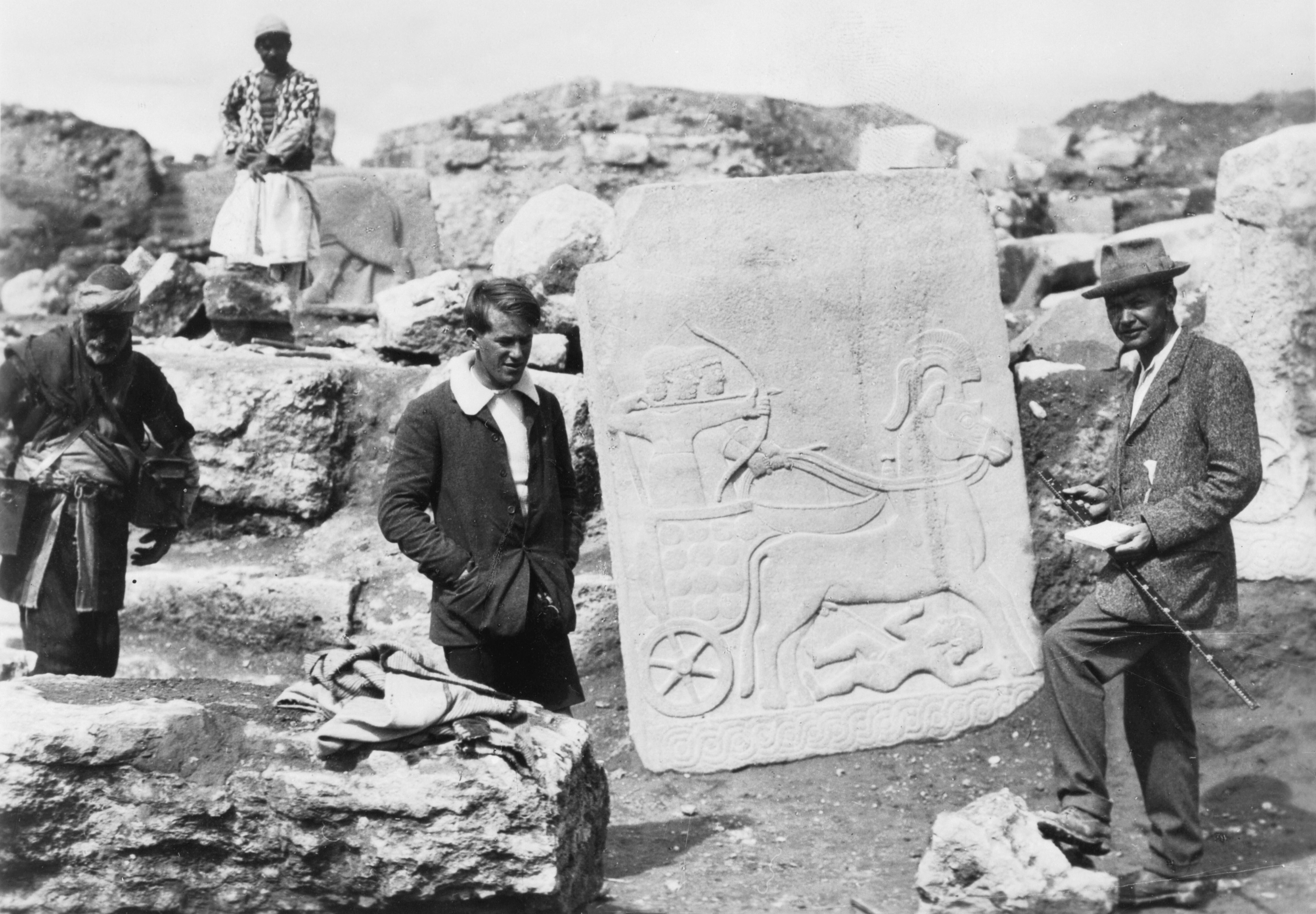 T. E. Lawrence ve L. Woolley Karkamış kazıları sırasında.